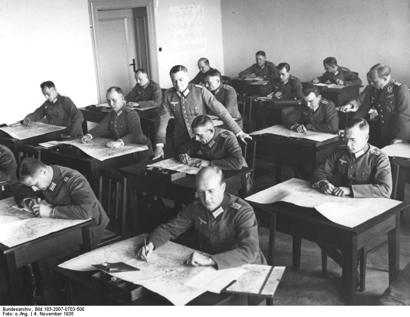 Berlin, Kriegsakademie, Lehrsaal Die wiedereröffnete Kriegsakademie in Berlin, Blick in einen Lehrsaal 35893-35 [Kriegsakademie in Berlin-Moabit]